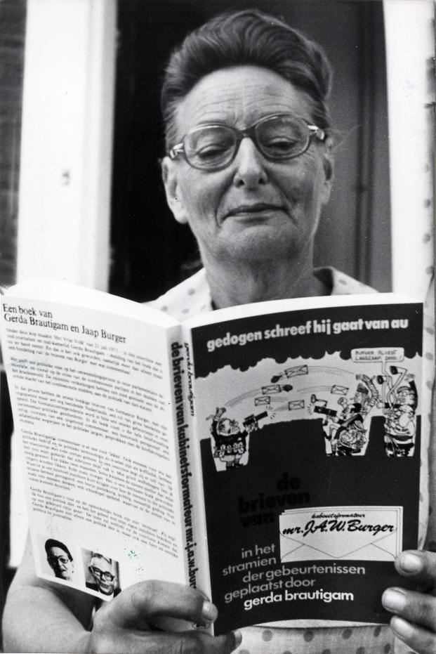 Brautigam, G. (PvdA).Gerda Brautigam met haar nieuwe boek "Gedogen Schreef Hij Gaat van AU", tijdens de presentatie van haar boek in het Boekhuis in Amsterdam. Nederland, Amsterdam, 13 september 1973.